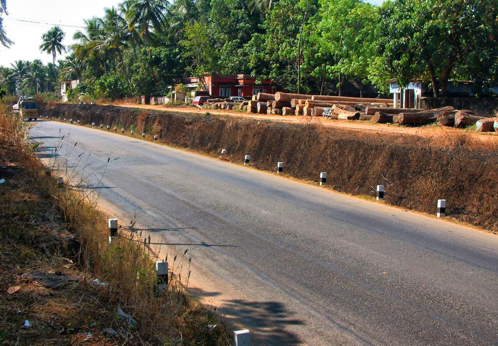 NH 47 passing through where once Travancore lines stood.